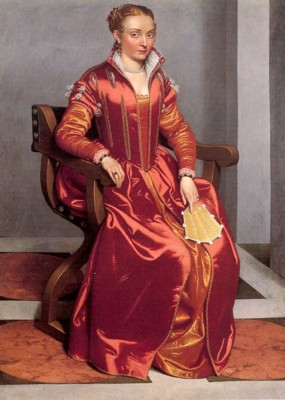 «La dama in rosso» (portrait de Lucia Albani Avogadro ?), h/t, 155 x 106.8 cm, National Gallery, Londres